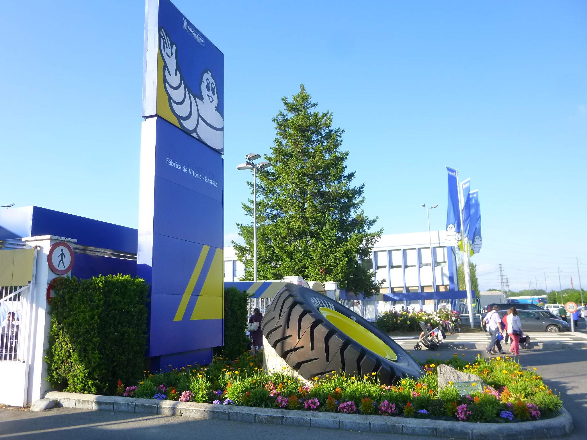 Vitoria - Fábrica SAFEN Michelín